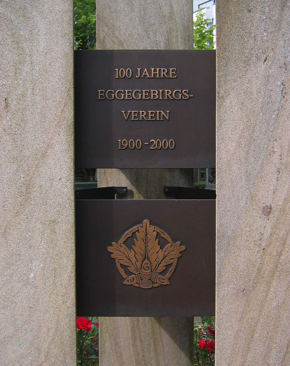 Denkmal auf dem Rathausvorplatz, Bad Driburg, Deutschland; errichtet anlässlich des 98. Deutschen Wandertags 1998; hier die Seite mit der Beschriftung „100 Jahre Eggegebirgsverein, 1900–2000“ und dem Vereinsabzeichen („EGV-Wappen“).